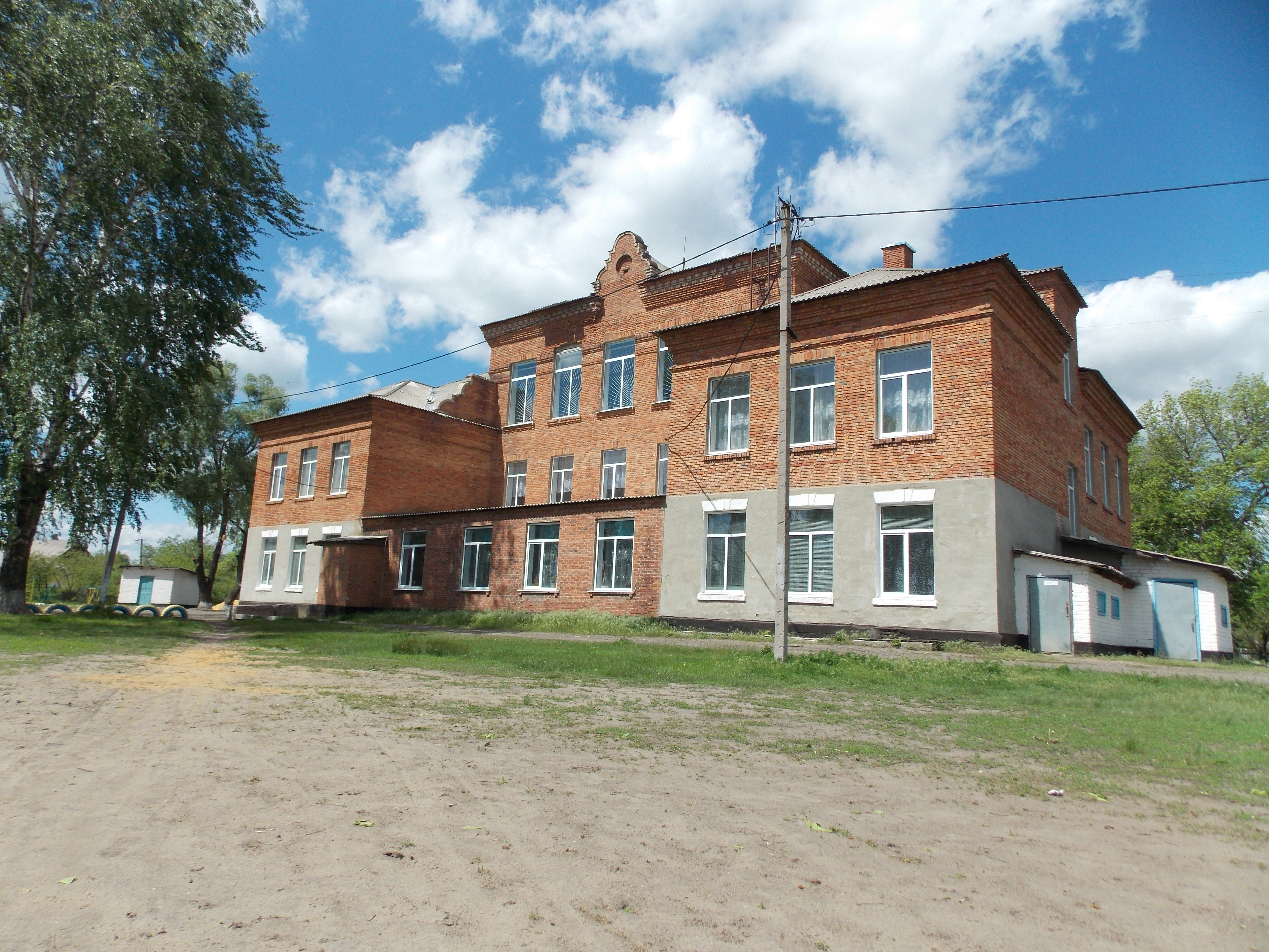 Підлиманська загальноосвітня школа I-III ст.